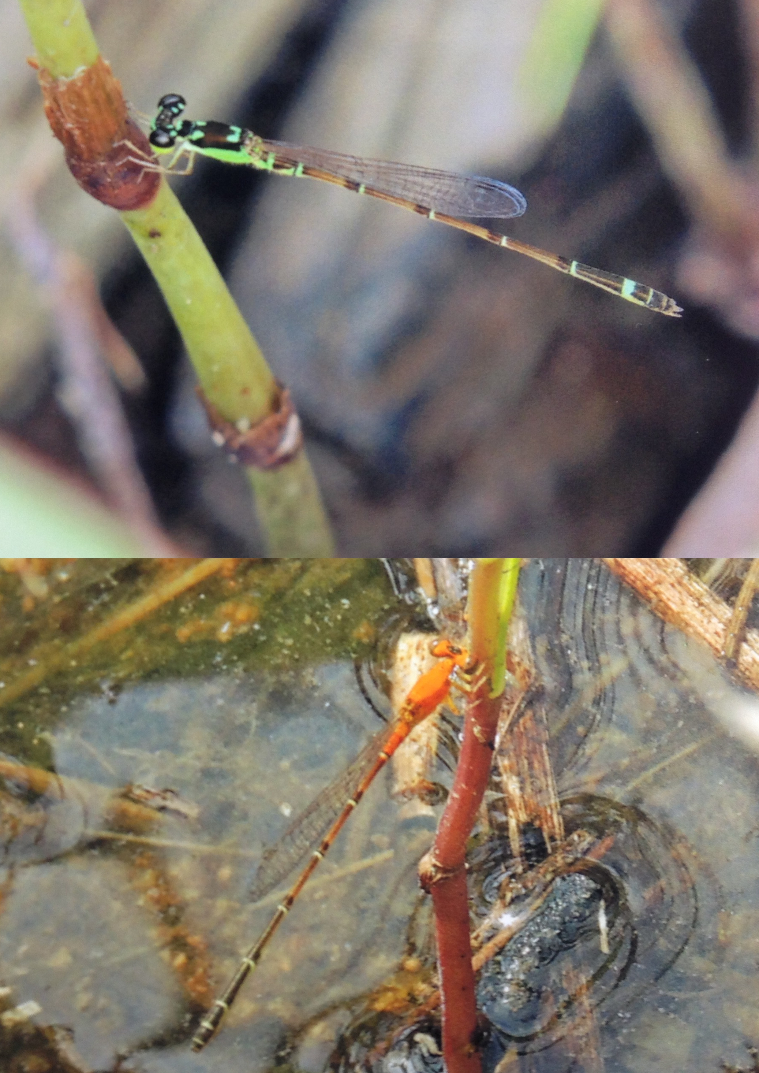 ヒヌマイトトンボのオスとメスの写真です。